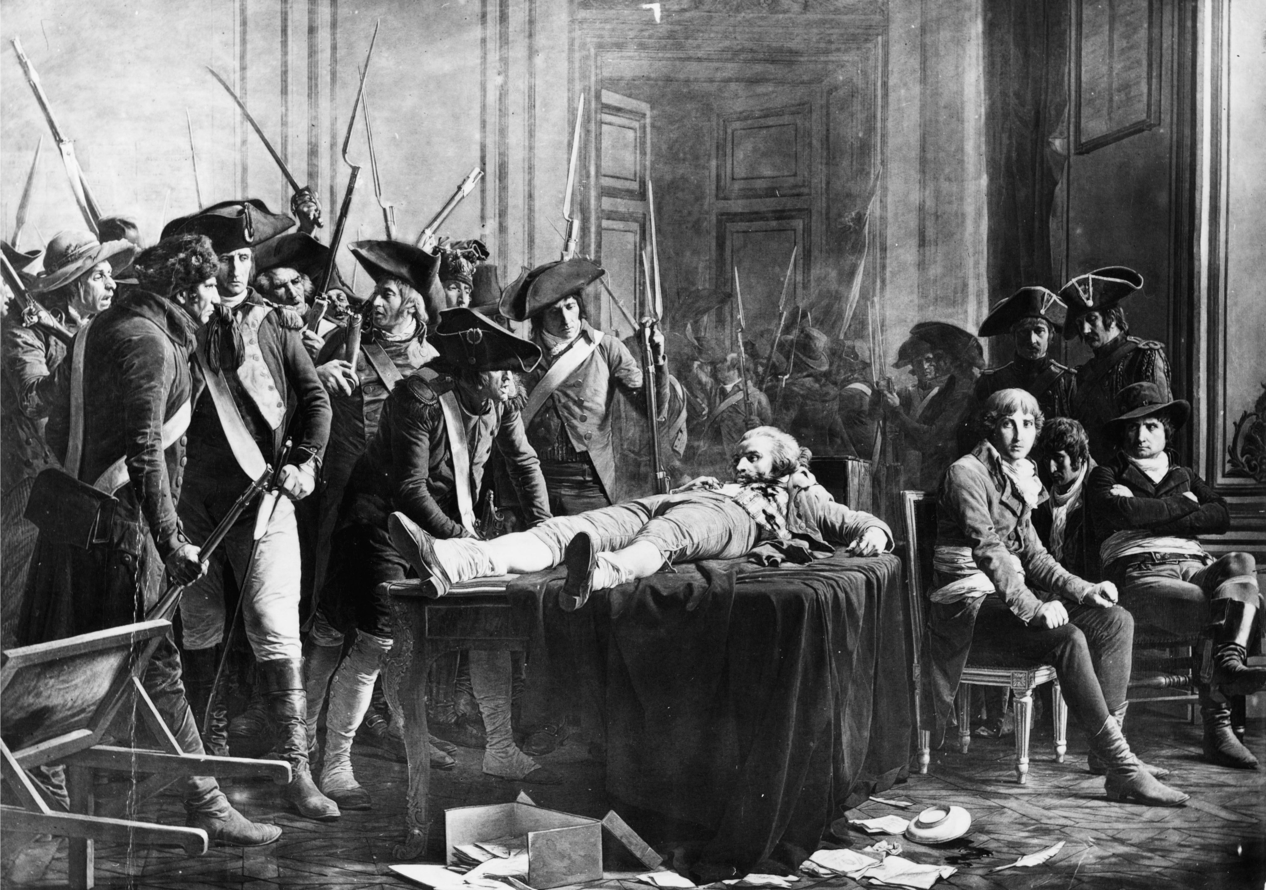 Lucien-Étietienne Mélingue Le 10 Thermidor Salon de 1877 (original non localisé)